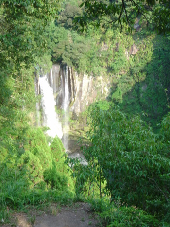 霧島犬養の滝